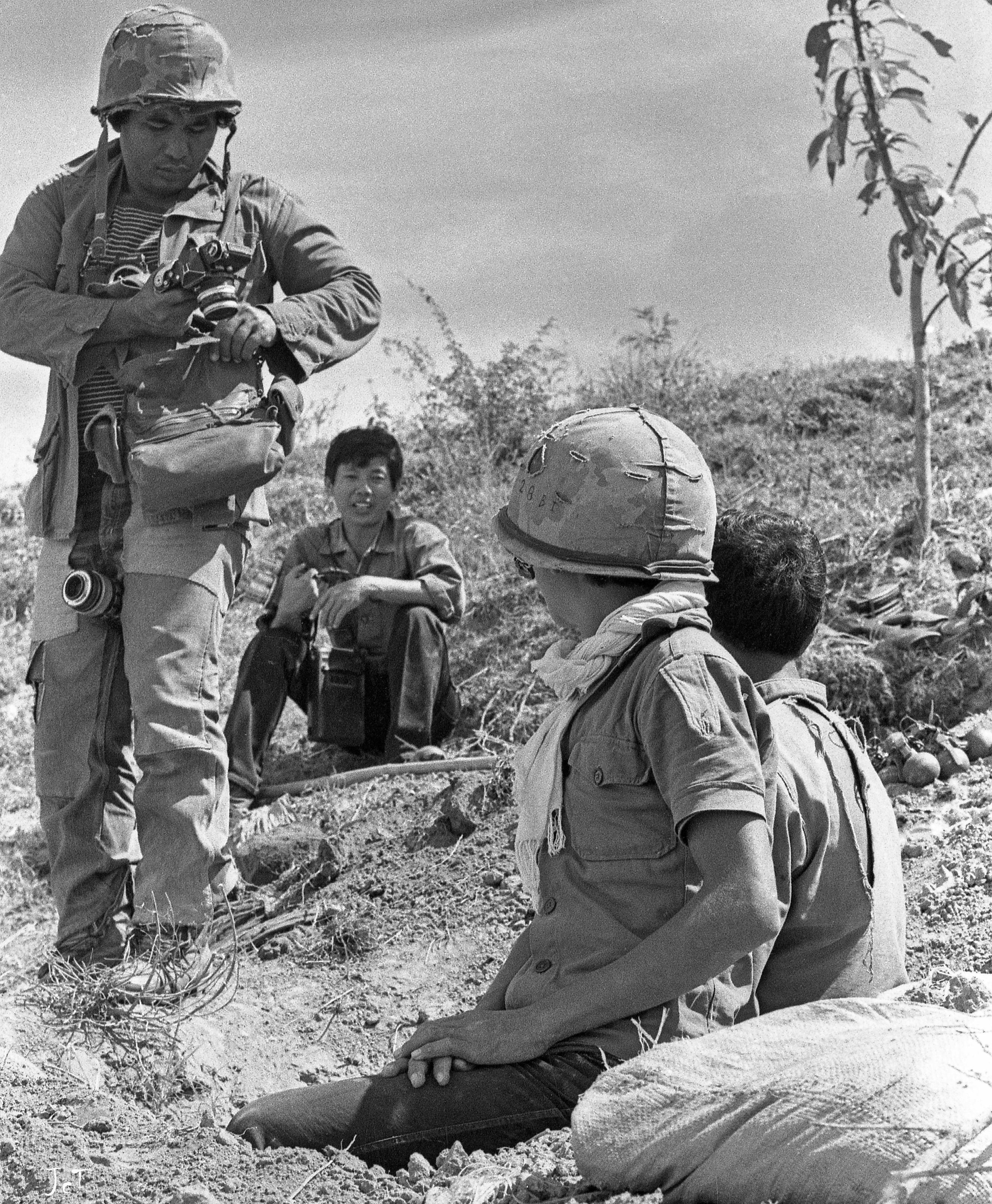 Cambodge 1975. Le journaliste cambodgien "Moon Face", fixeur du photographe français Jean-Christian Tirat